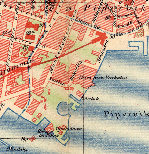 Aker Brygge and Tjuvholmen, Oslo.